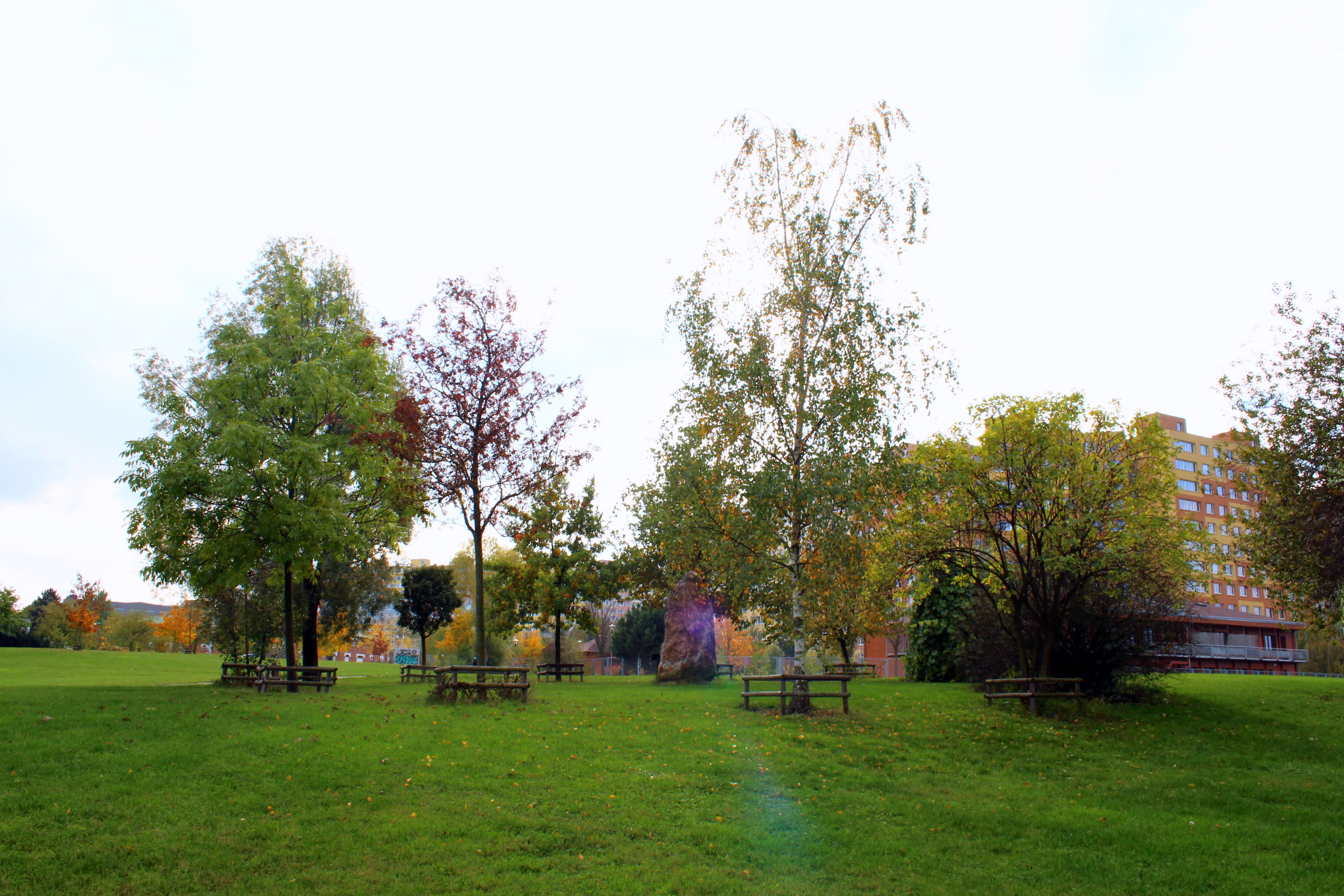 Keltský stromový kalendář, Centrální park (Stodůlky)